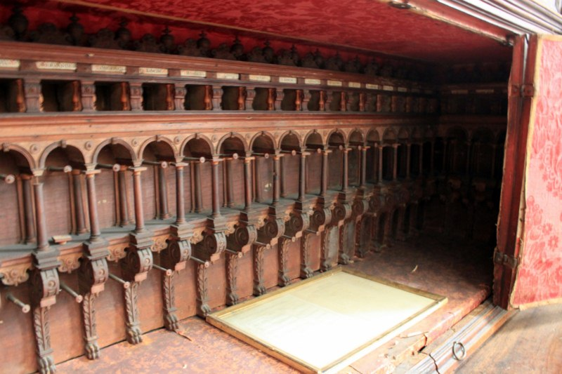 Chiesa di San Gaetano a Padova